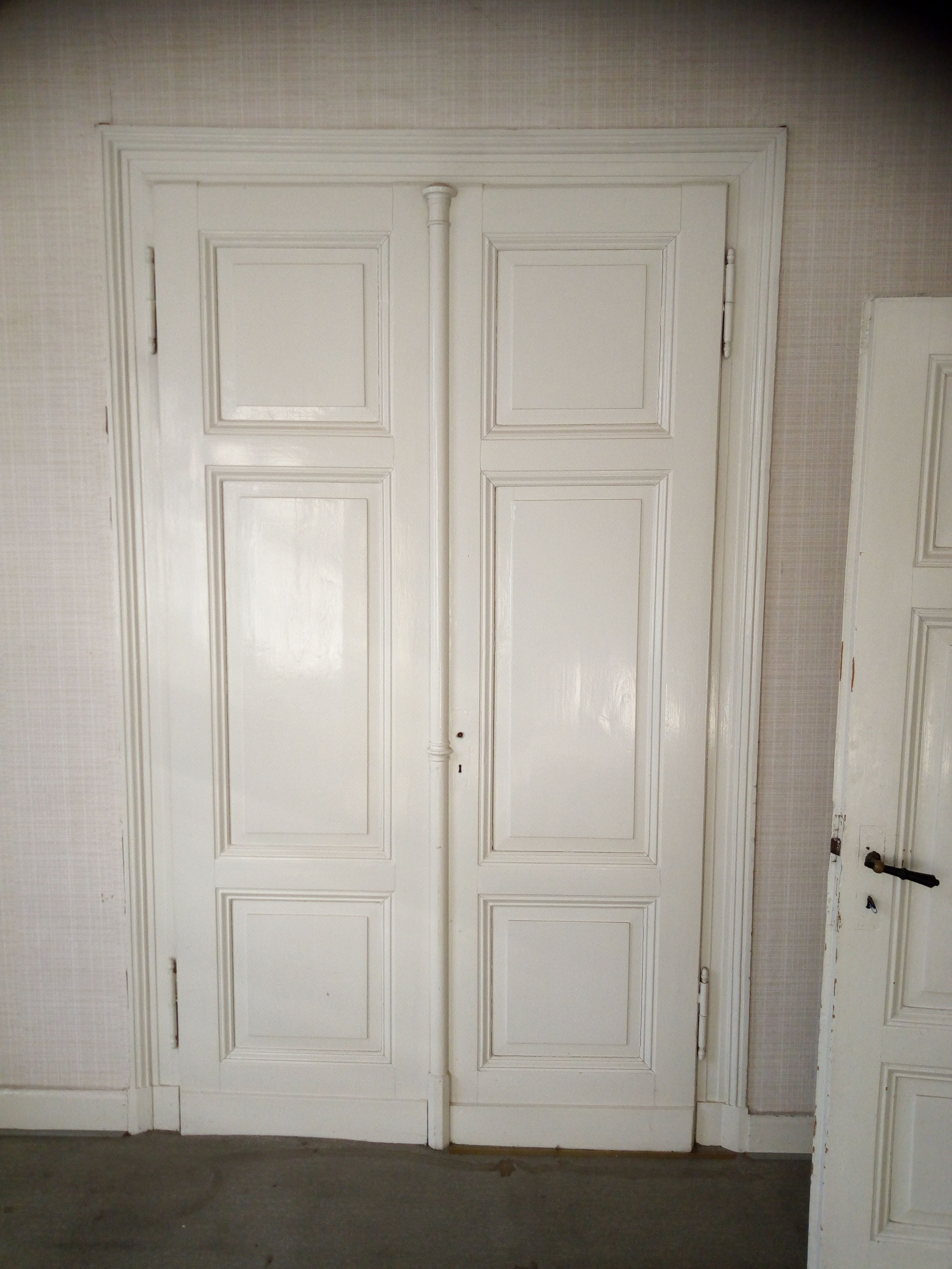 Markstraße 10, Warburg